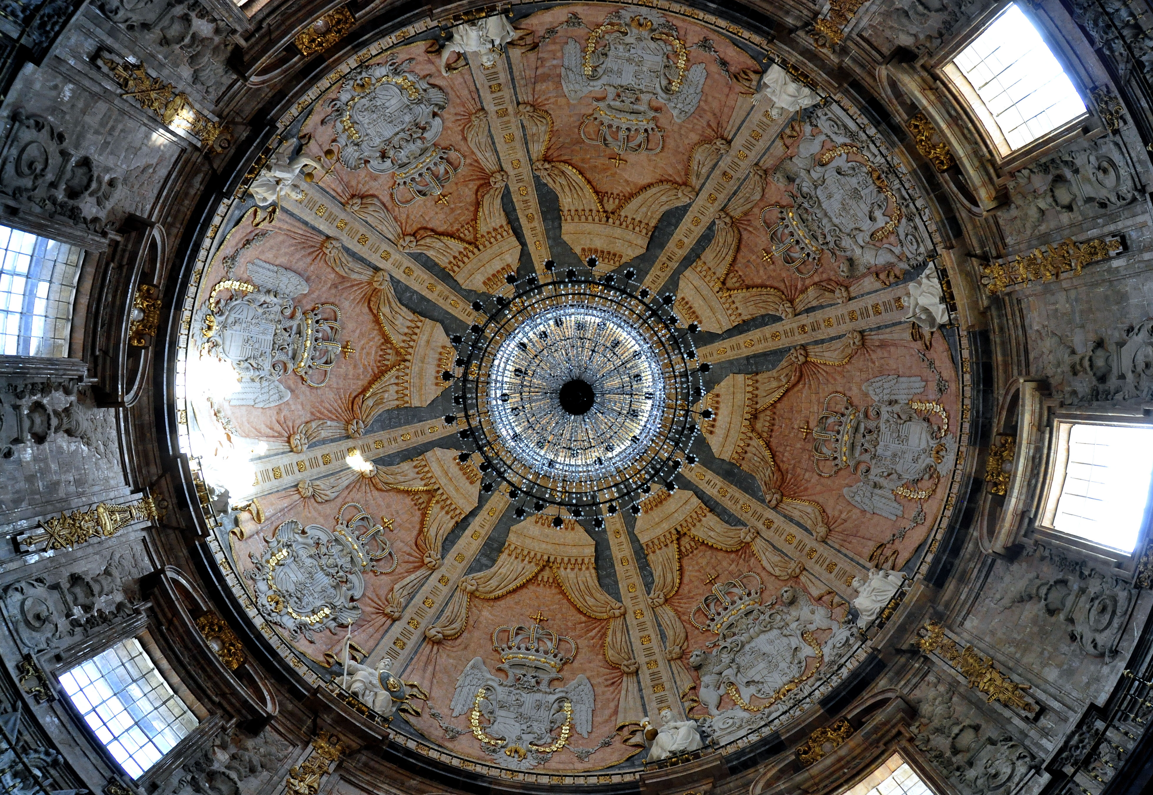 Cúpula del Santuario de Loyola, en Azpeitia (Guipúzcoa).